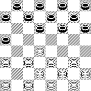 Отказанный кол